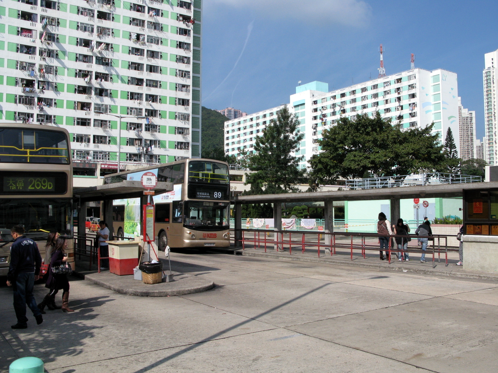 Lek Yuen Estate Bus Terminus 瀝源邨巴士總站